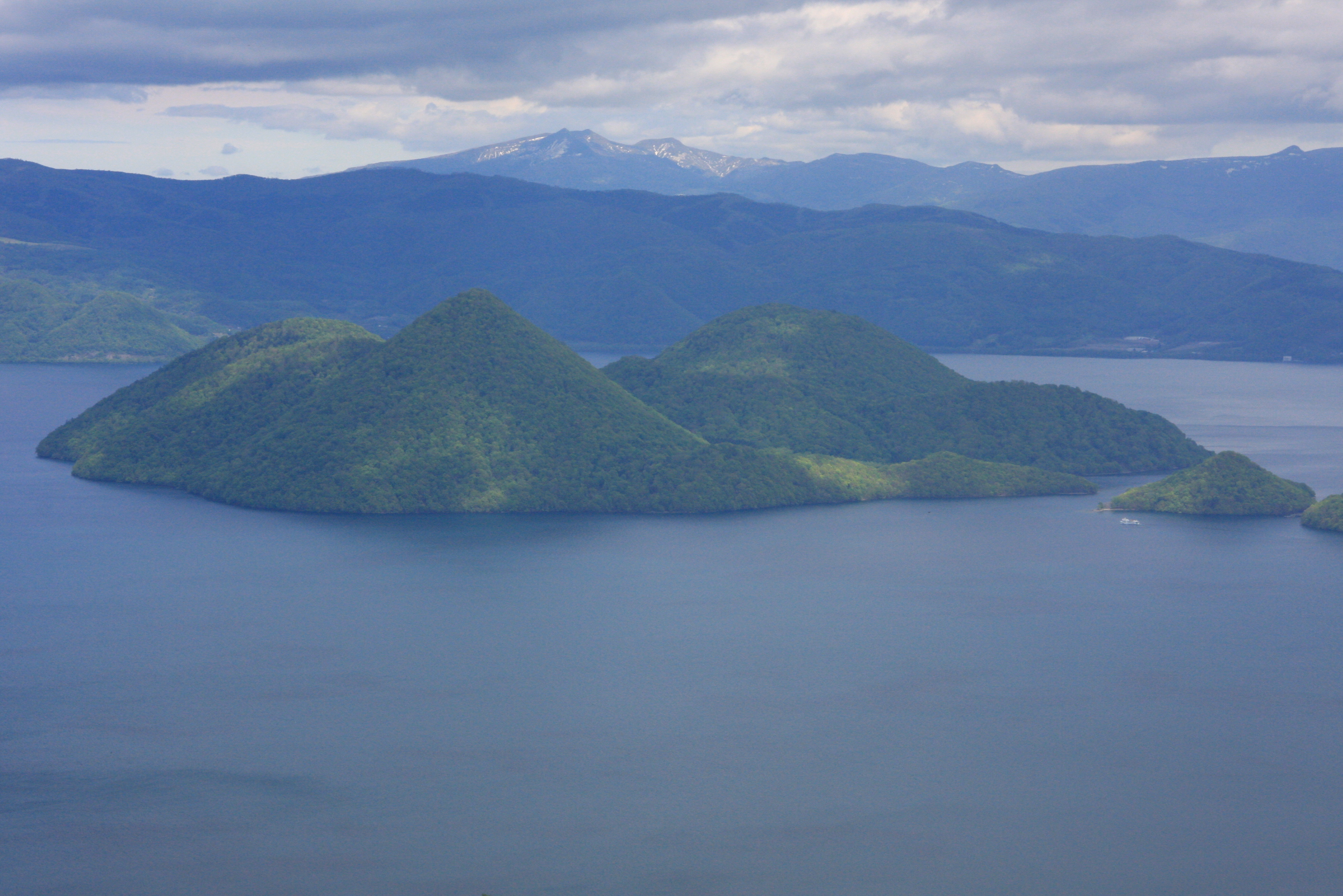 ポロモイ山から望むトーノシケヌプリ（洞爺湖中島）